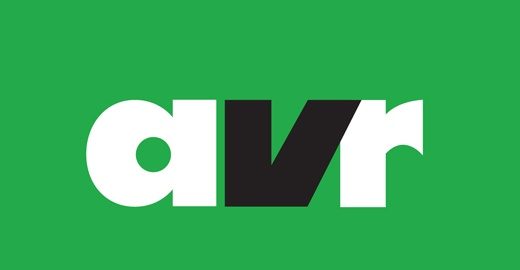 avr - Allg .Vliesstoff-Report